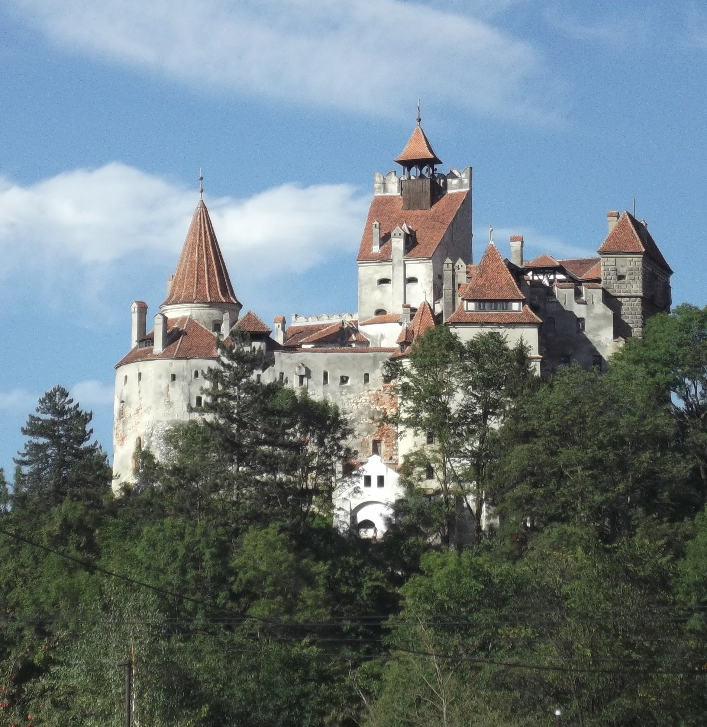 Castelul Bran, România 01